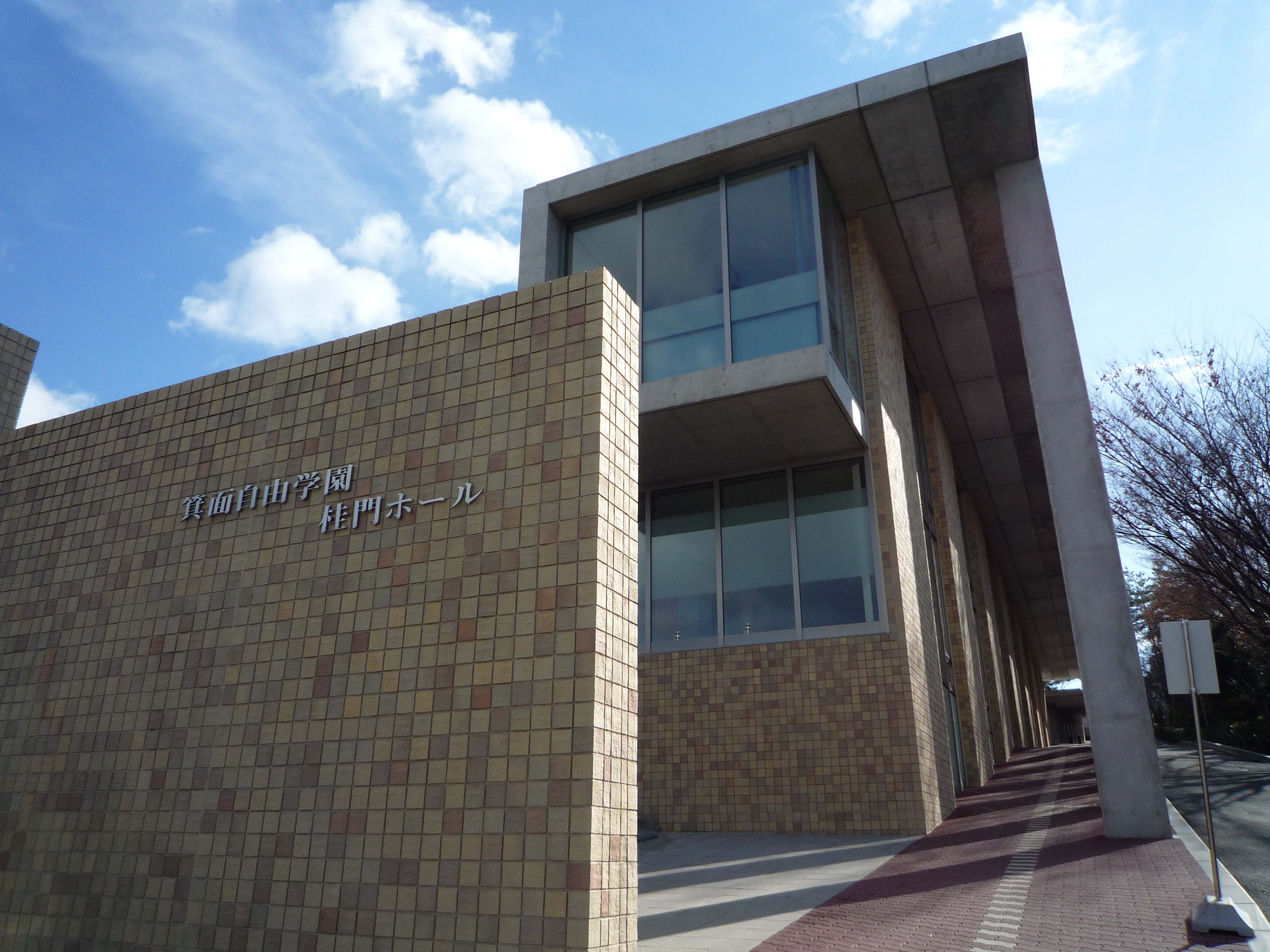 箕面自由学園中学校・高等学校桂門ホール